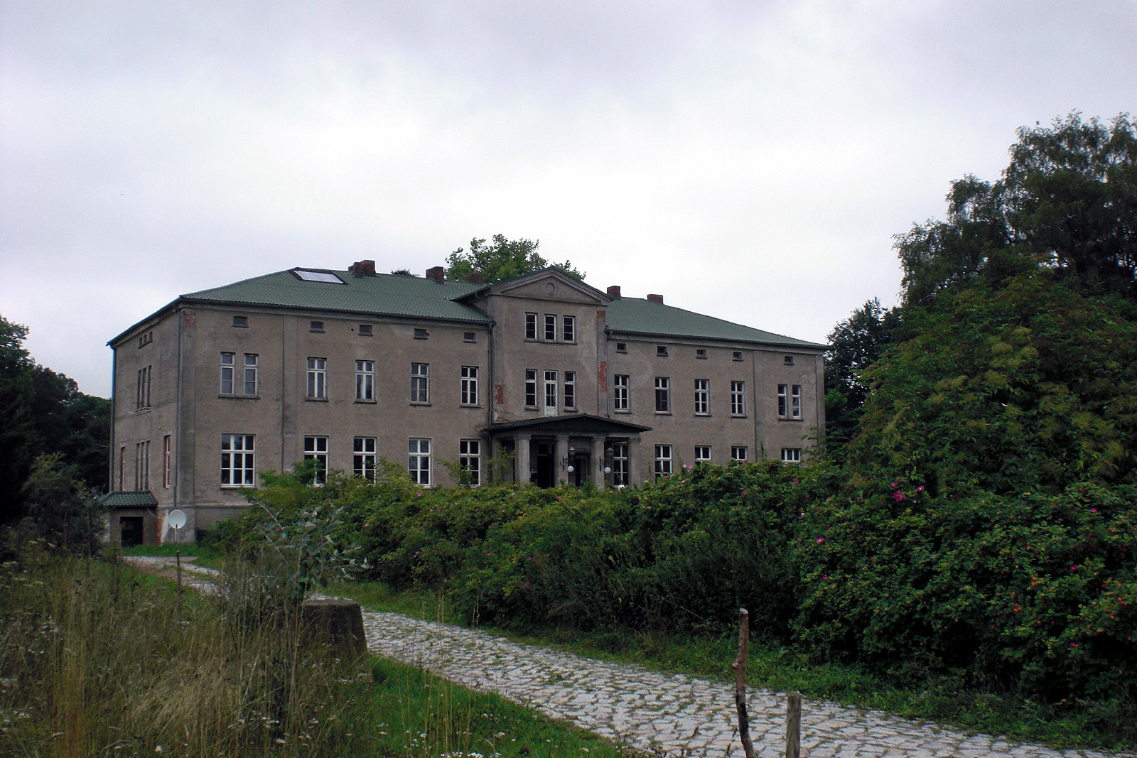 Gutshaus Dersentin in Lalendorf (Mecklenburg-Vorpommern) Datum: 15.08.2010 Urheber: onnola (Flickr-User) Quelle